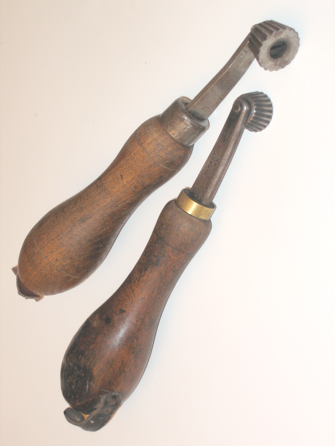 Outil de bottier source familiale / photo Dominique grassigli